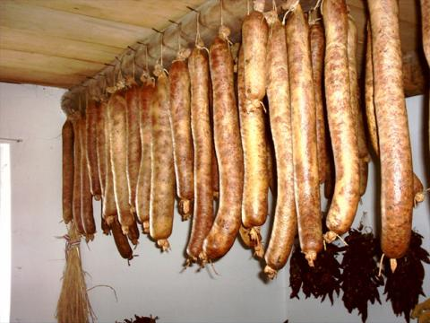 Sausages, Hungary